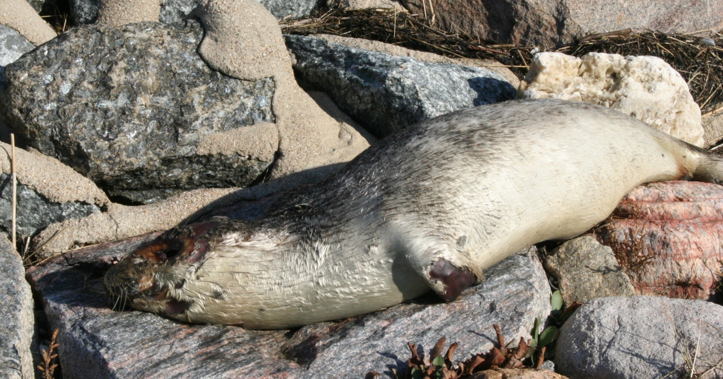 Toter Seehund an der Steinkante auf Hallig Langeness Okt. 2009